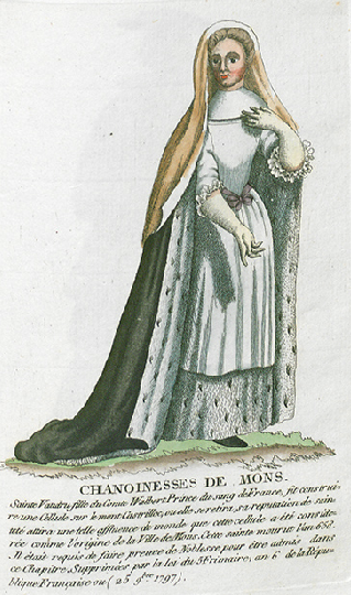 Collection de costumes de tous les ordres monastiques, supprimés à differentes époques, dans la ci-devant Belgique, Bruxelles, Philippe Joseph Maillart et sœur, 1811